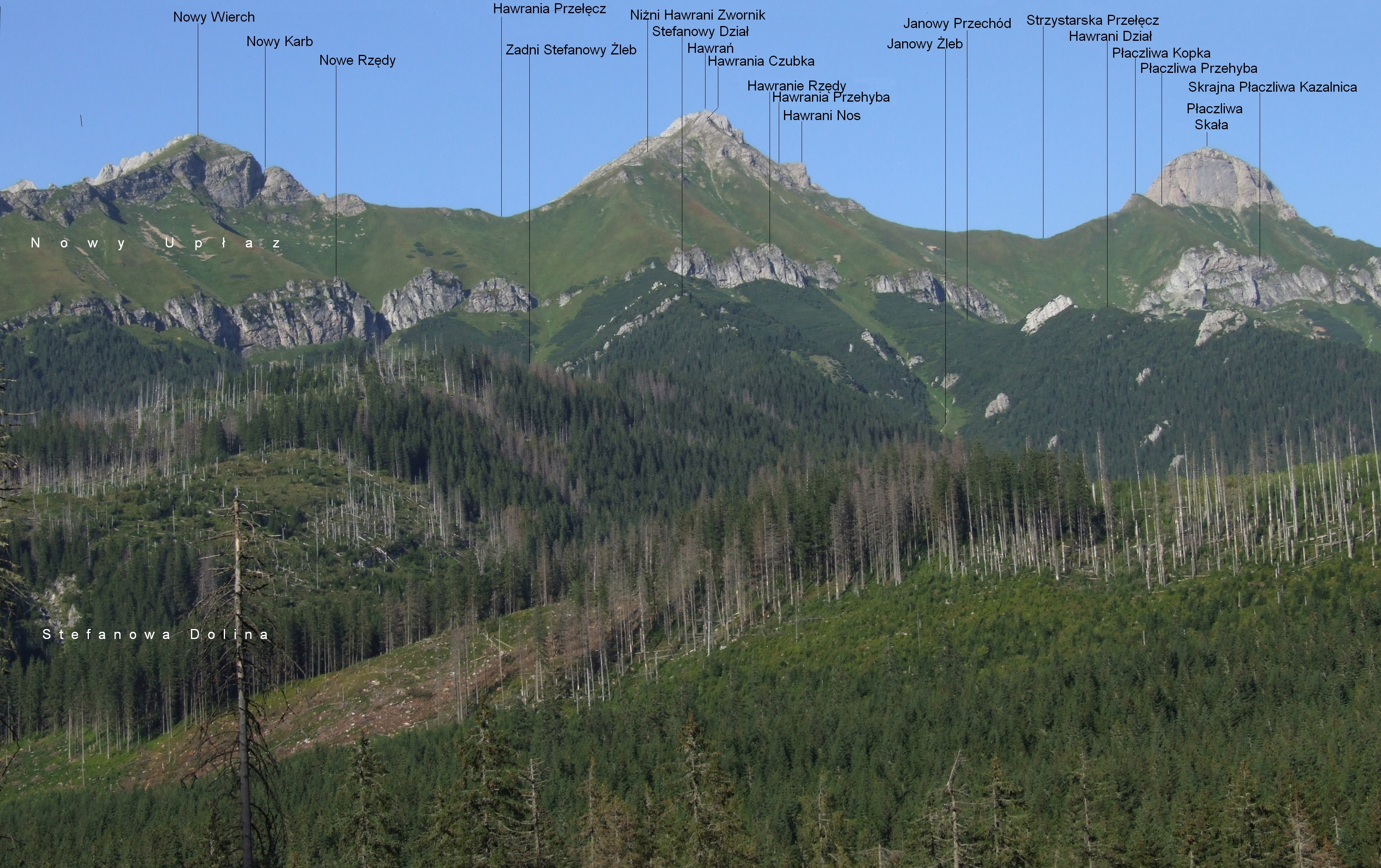 Widok z Dolin yJaworowej na Tatry Bielskie